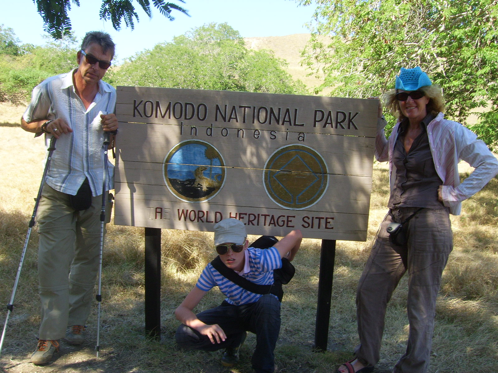 Toegangsbord bij de ingang van Komodo National Park op Rinca.